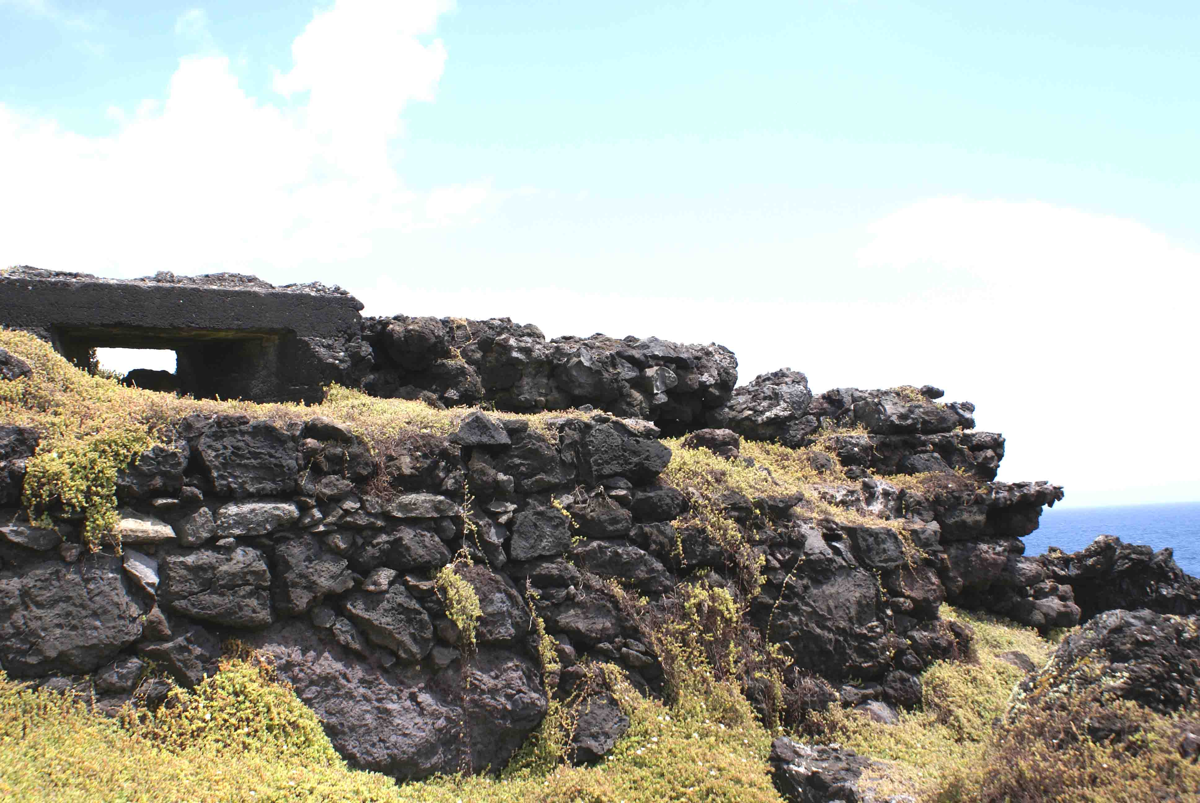 Forte da Má Ferramenta, restos da muralha Oeste, São Mateus da Calheta, ilha Terceira, Açores, Portugal.